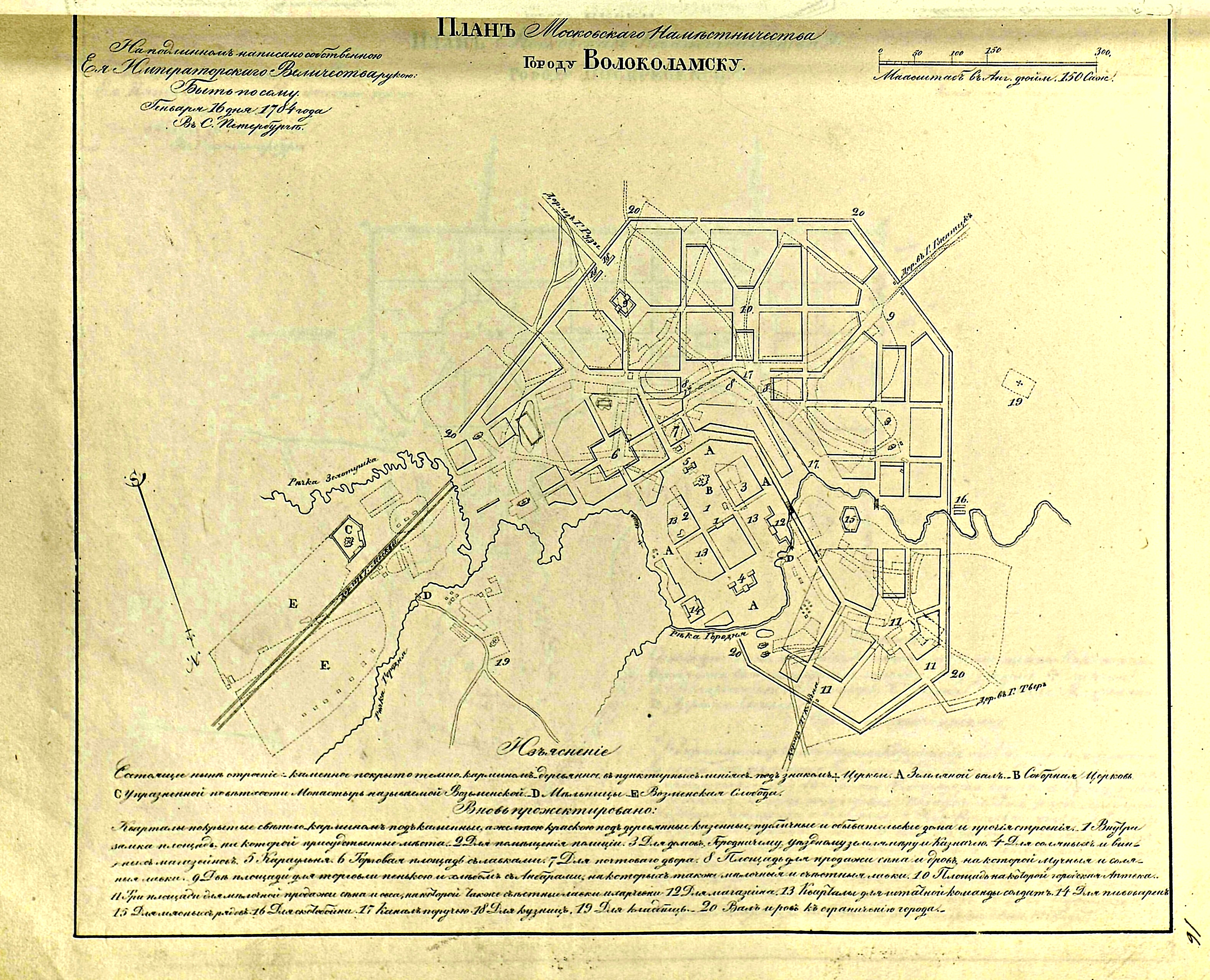 "Прожектированный" план города Волоколамска 1784 года из "Полного собрания законов Российской Империи. Книга чертежей и рисунков. Планы городов."